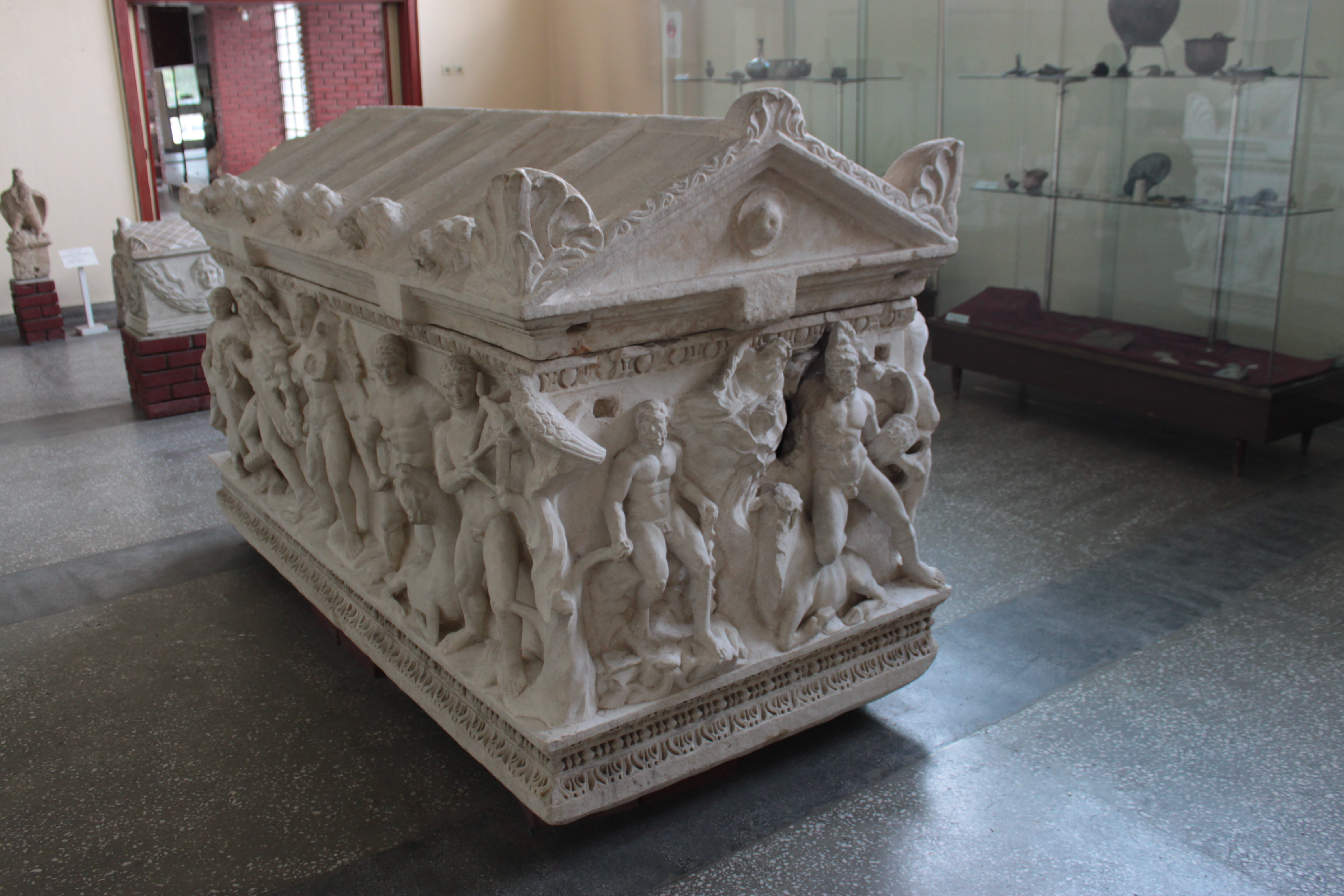 Kayseri Herakles Lahdi, Kayseri Arkeoloji Müzesi'nde tarafımdan çekildi.